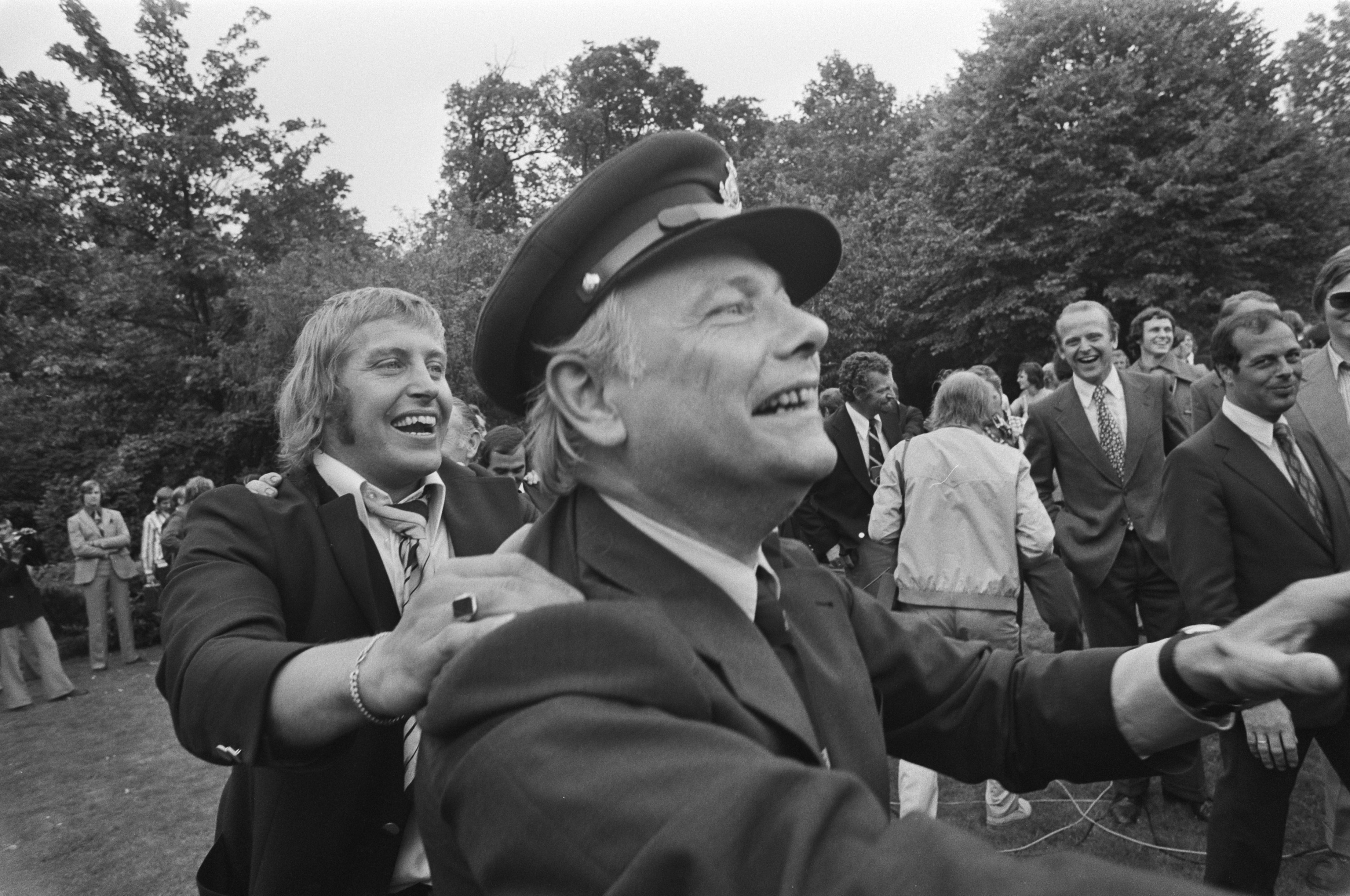 Collectie / Archief : Fotocollectie Anefo Reportage / Serie : [ onbekend ] Beschrijving : Den Uyl ontvangt Nederlands elftal op Catshuis; Den Uyl met pet van muzikant, achter hem Schrijvers Datum : 8 juli 1974 Trefwoorden : elftallen, muzikanten, ontvangsten, sport, voetballers Persoonsnaam : Uyl, Joop den Fotograaf : Mieremet, Rob / Anefo Auteursrechthebbende : Nationaal Archief Materiaalsoort : Negatief (zwart/wit) Nummer archiefinventaris : bekijk toegang 2.24.01.05 Bestanddeelnummer : 927-3163